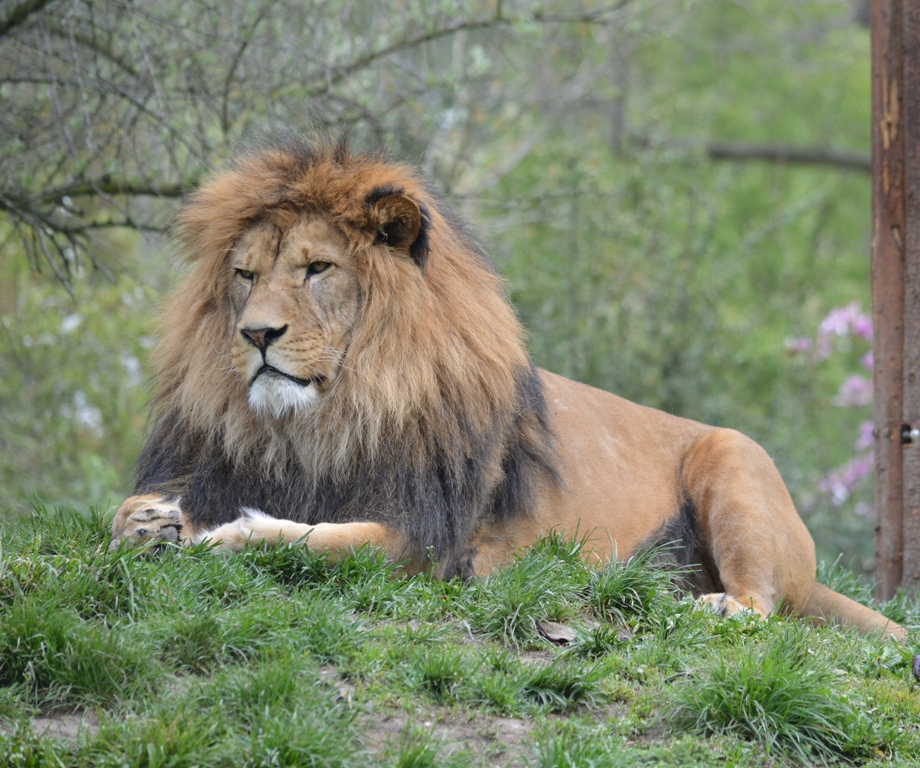 lev berberský v plzeňské zoo